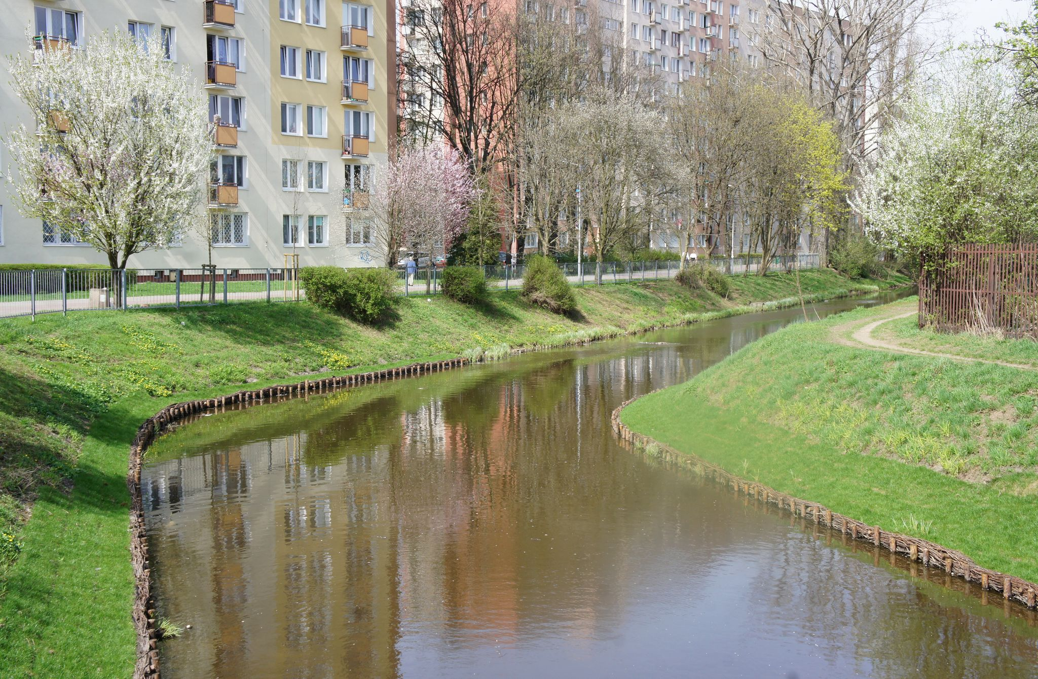 Kanał Wystawowy w Warszawie.